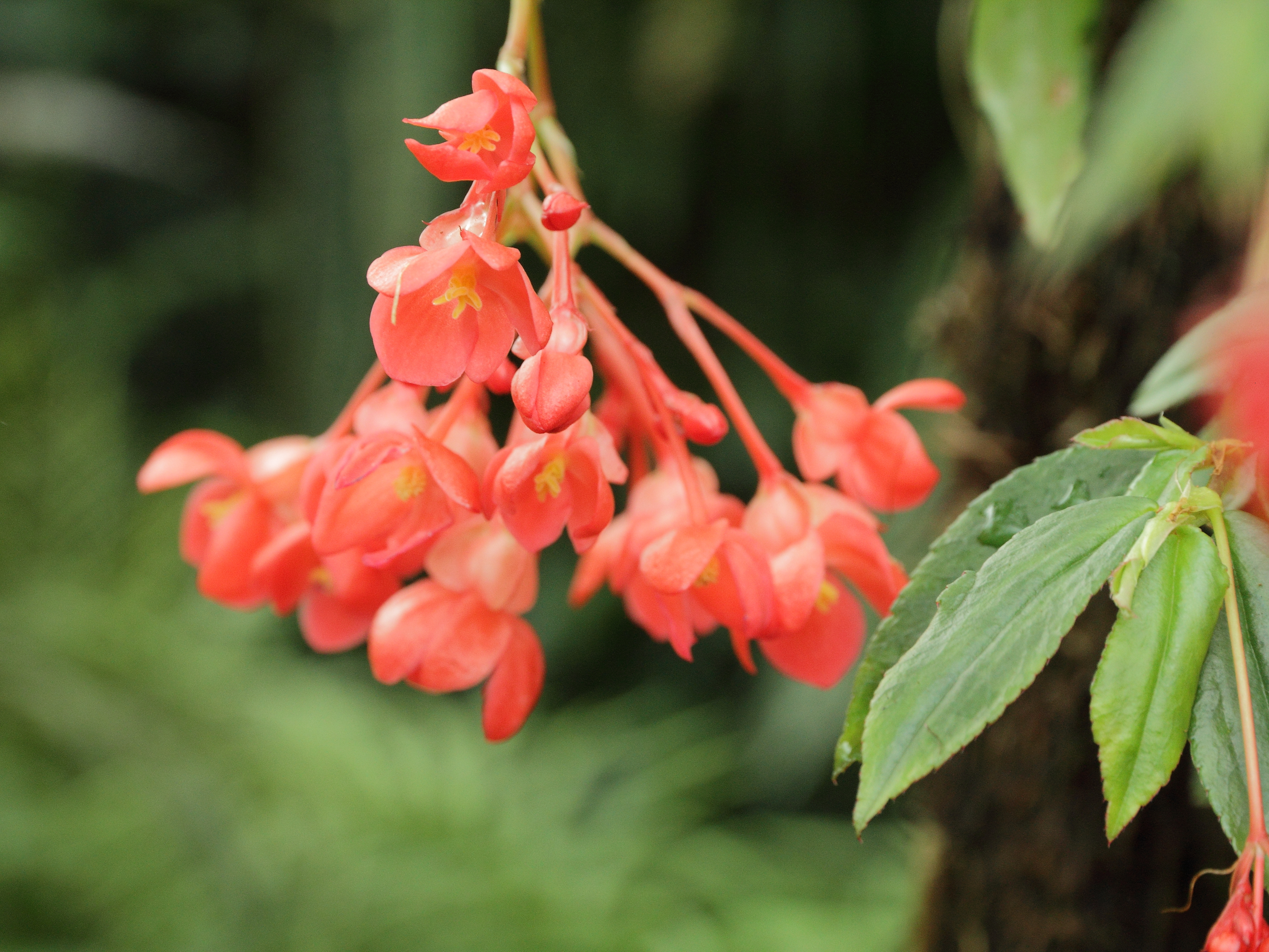 Begonia foliosa i Bergianska trädgården.